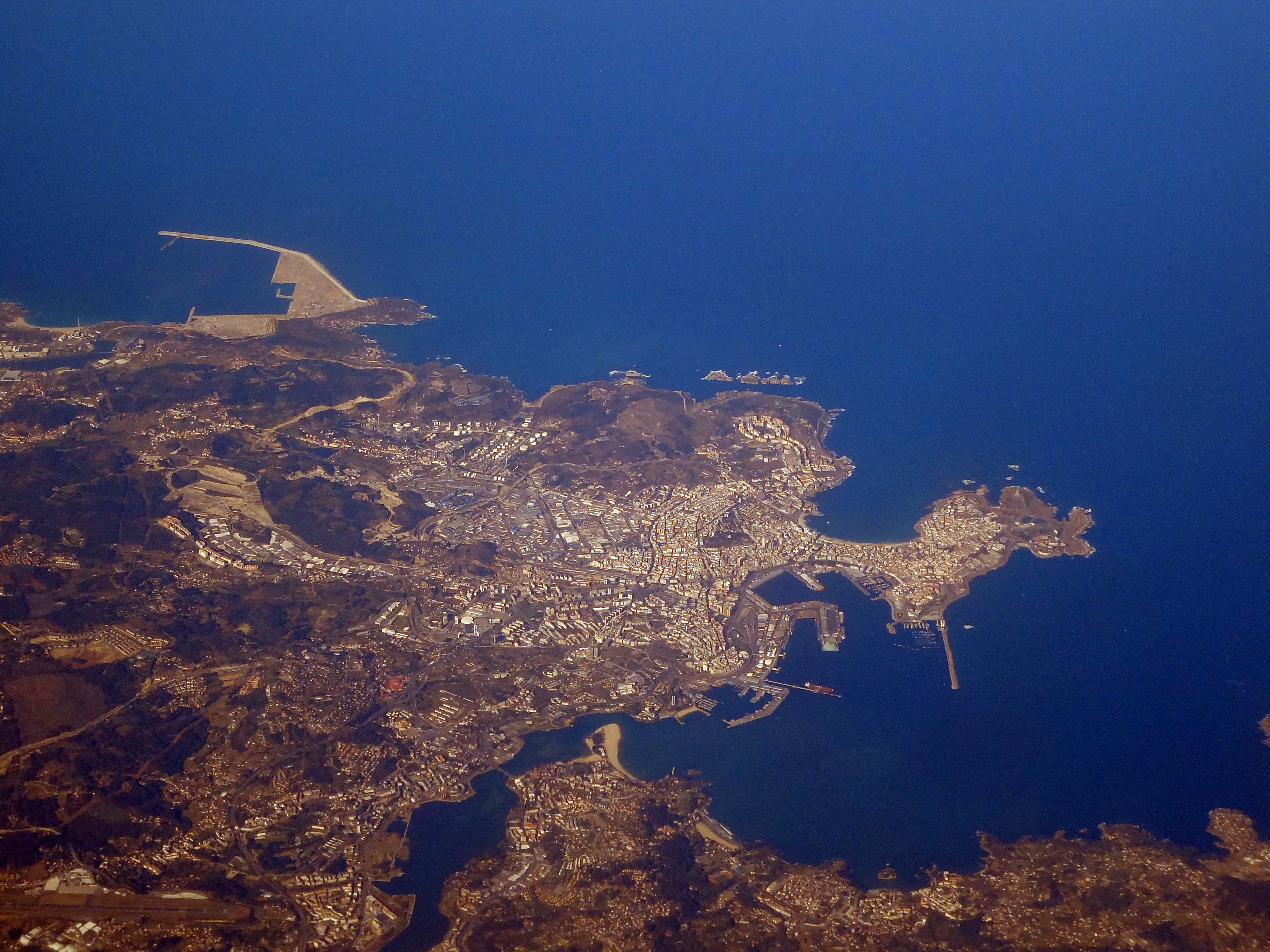 Vue aérienne de La Corogne, A Coruña